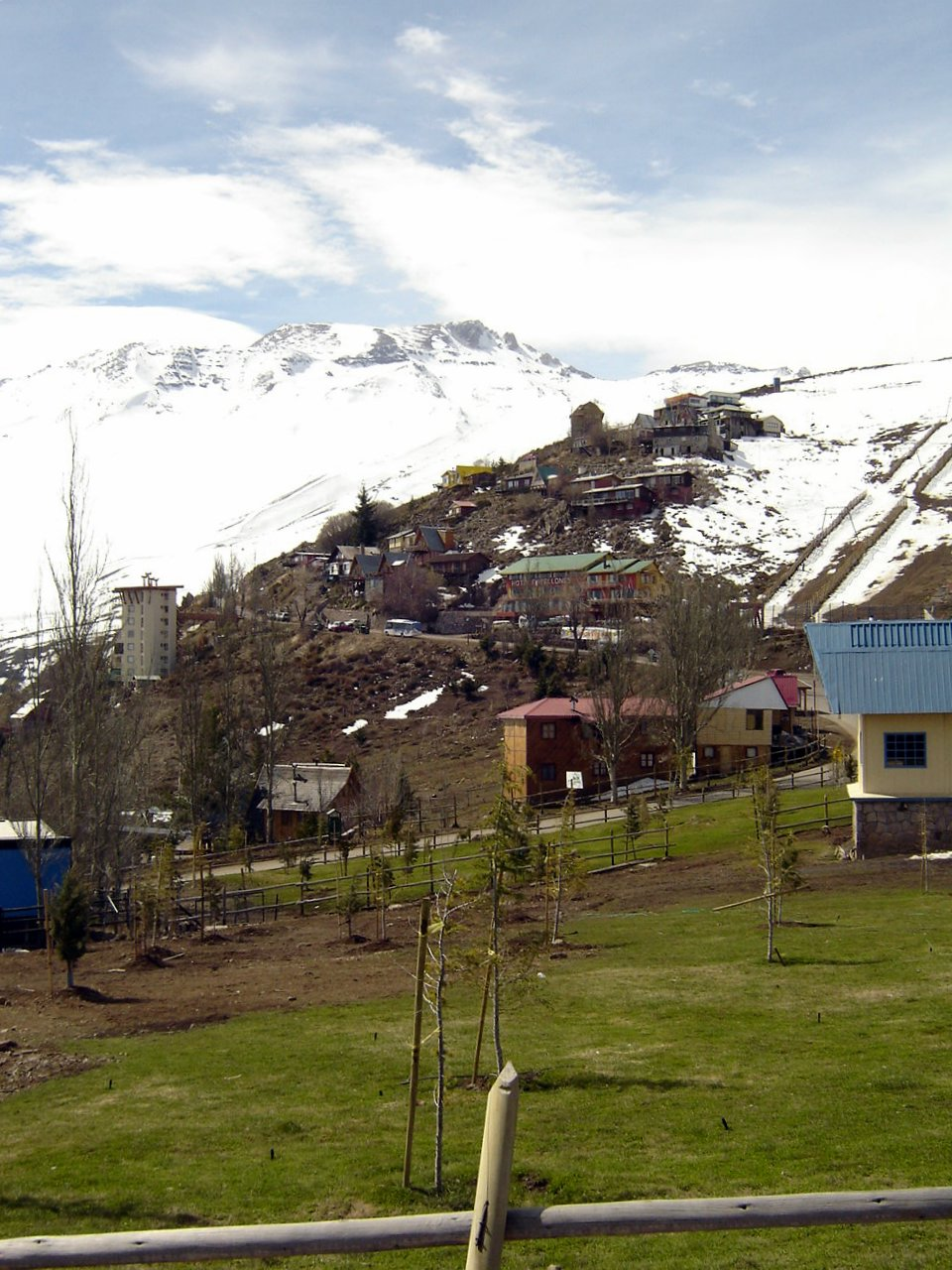 Farellones, al oriente de Santiago de Chile